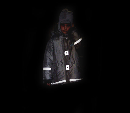 Le bandes de tissus réfléchissant apposées sur des vêtements, chaussures, cartables, etc. en rendant visible un objet ou une personne améliorent la sécurité routière, de manière économique, simple et efficace.